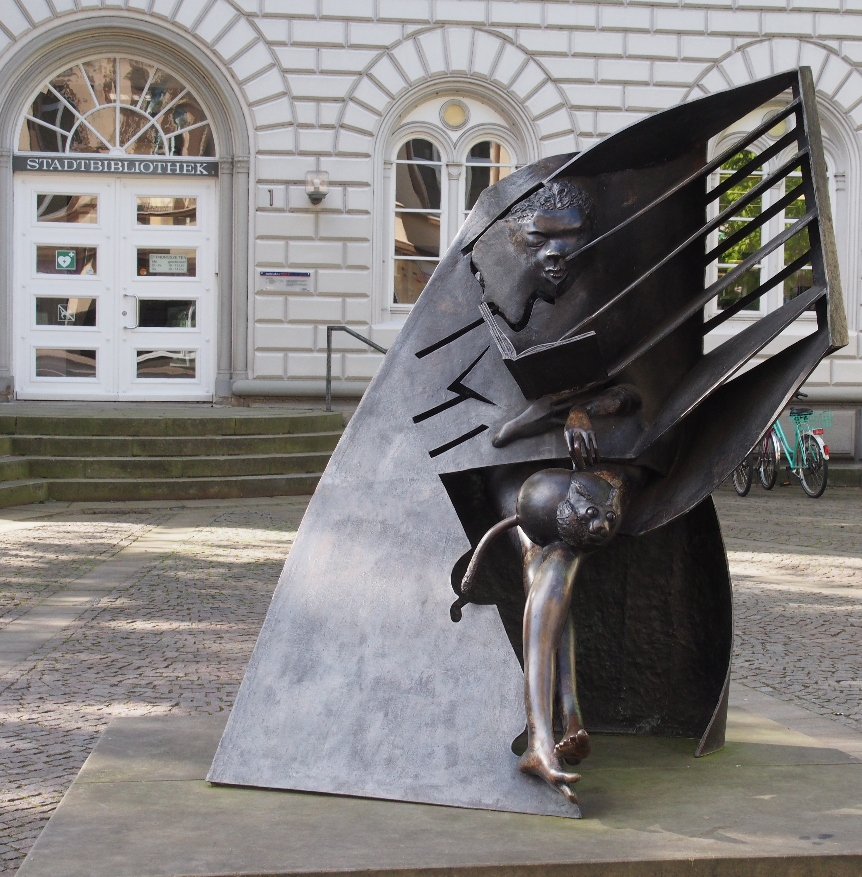 Skulptur vor der Stadtbibliothek in Celle. „Die Lesende (Lecture, Jean Ipousteguy)“